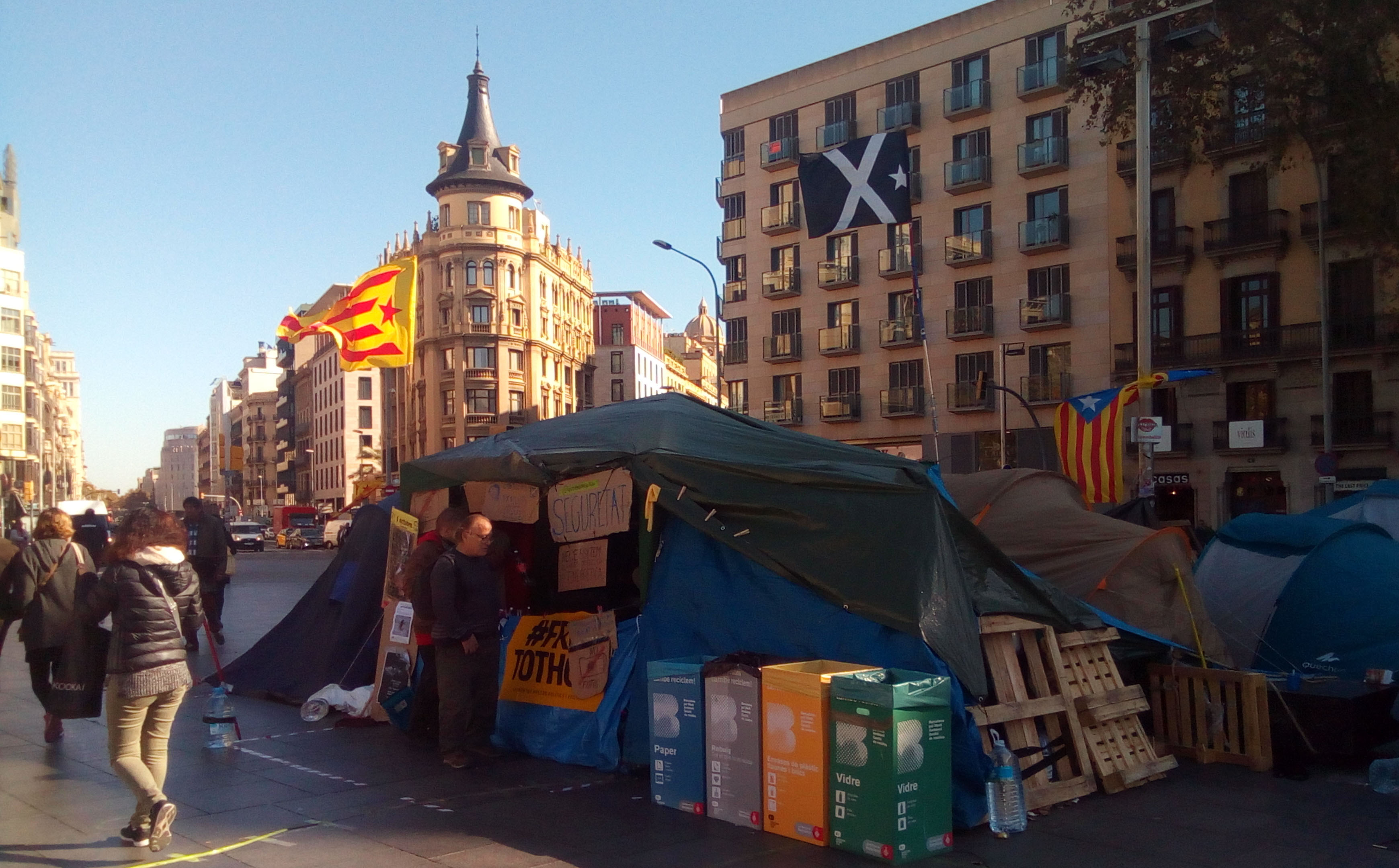 Acampada en la plaza Universitat.